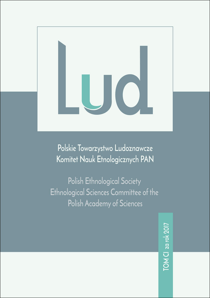 Okładka sto pierwszego tomu czasopisma naukowego LUD, wydanego w Poznaniu w 2017 roku